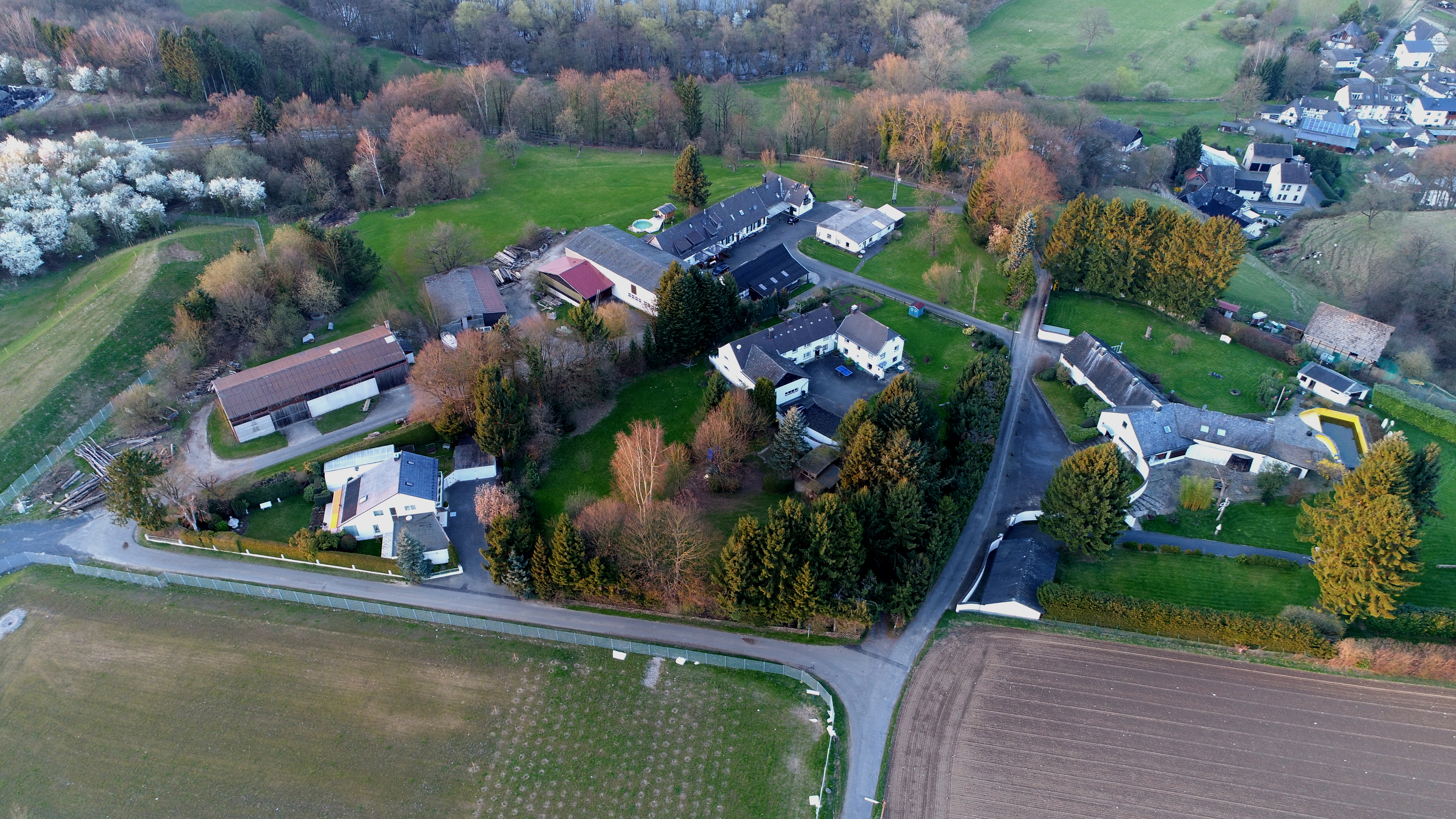 Hossenberg, Stadt Hennef (Sieg): Luftaufnahme